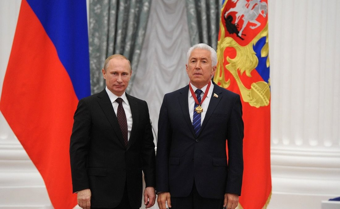 Орденом «За заслуги перед Отечеством» III степени награждён заместитель Председателя Государственной Думы Владимир Васильев